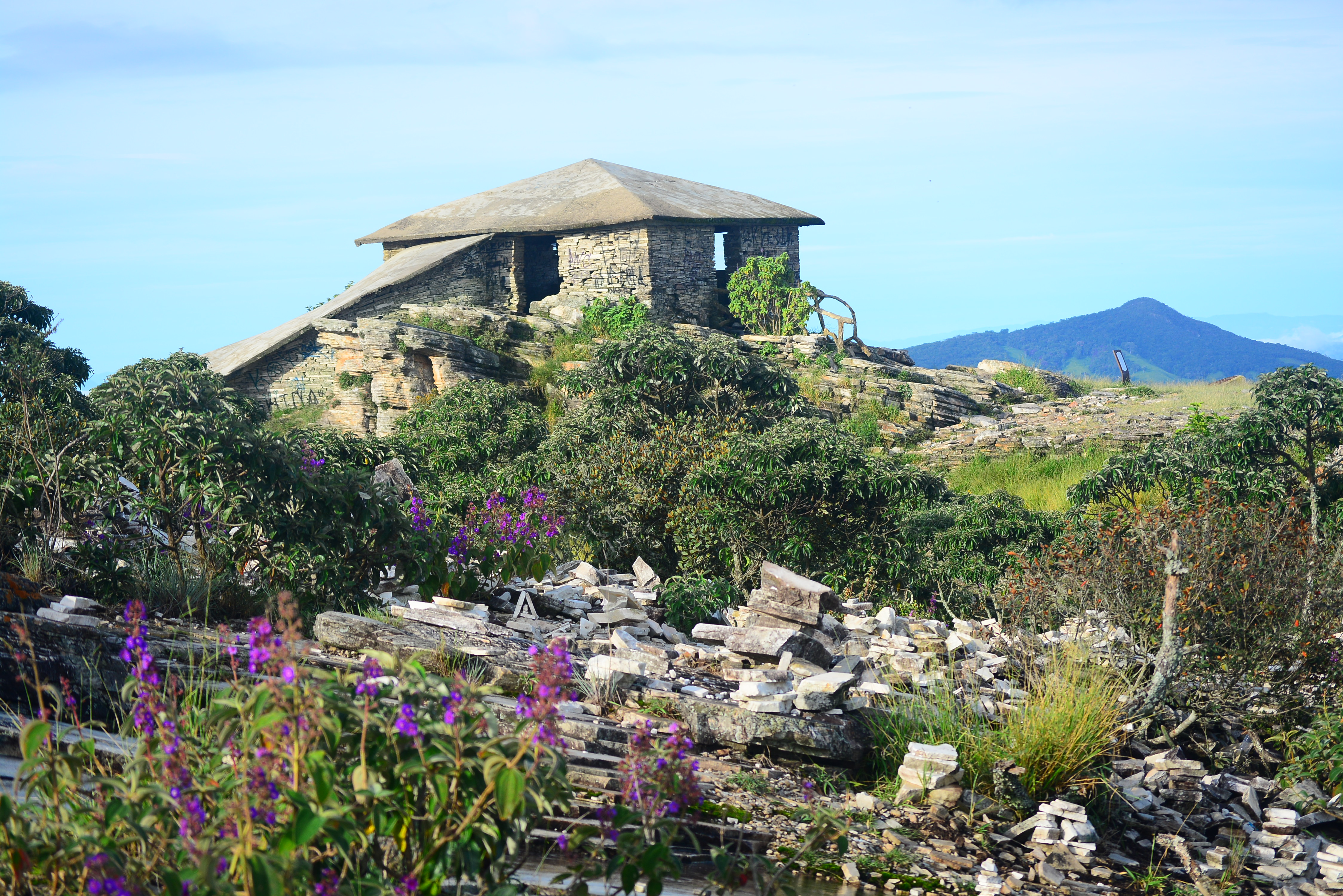 Casa da pirâmide em São Tomé das Letras